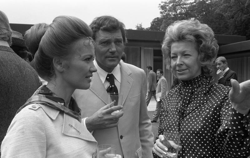 Bundeskanzler Willy Brandt empfängt Filmschauspieler